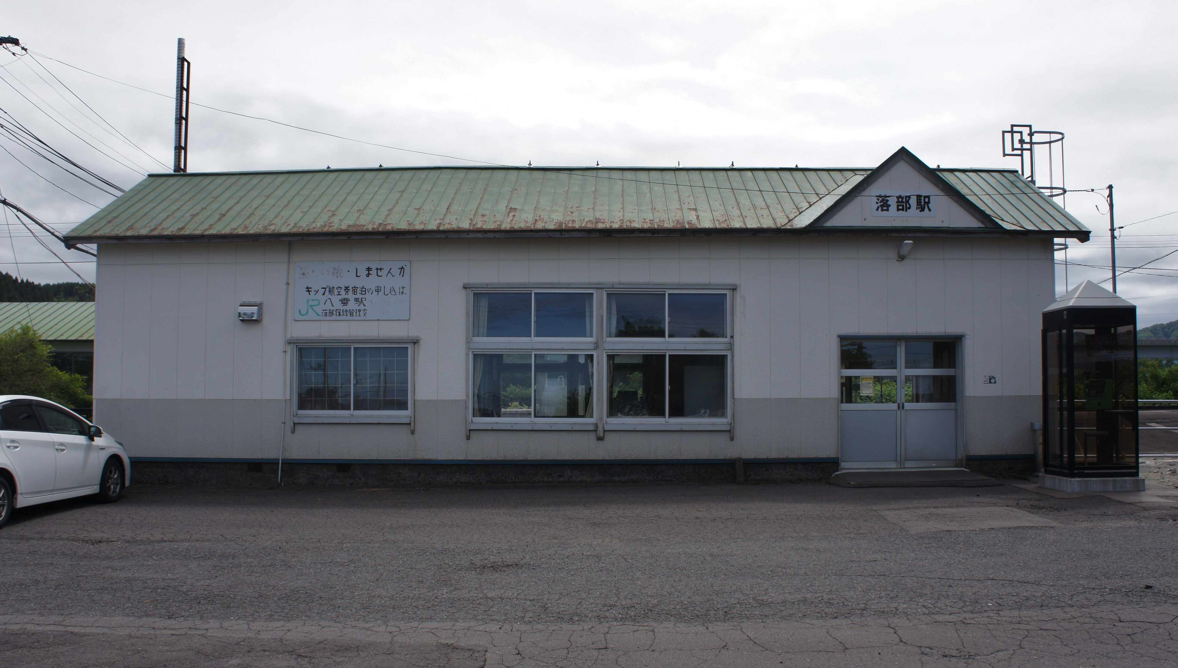 JR函館本線・落部駅の駅舎